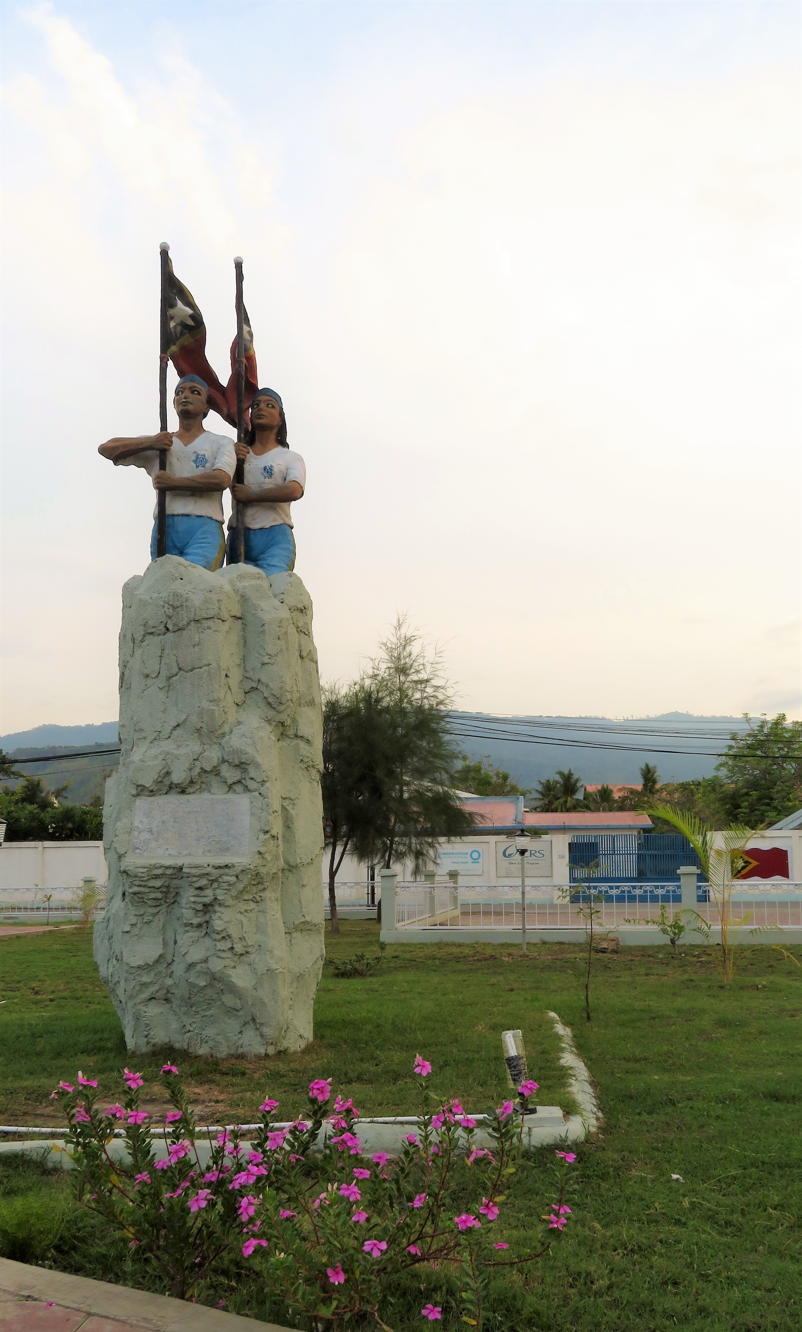 Denkmal im Park an der Avenida Nicolau Lobato, Dili, Osttimor